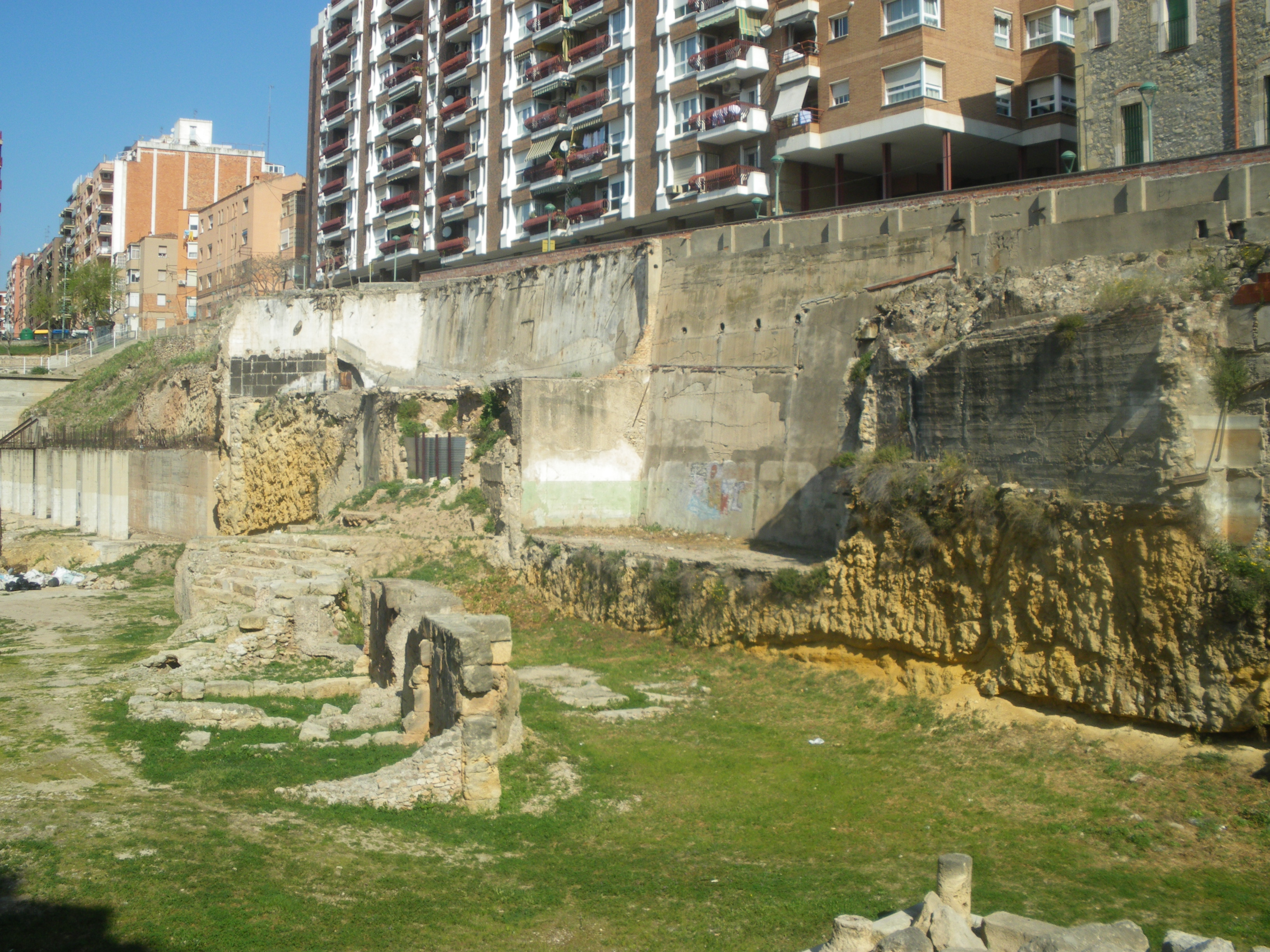 Vista del teatre Romà de Tarragona, a la part inferior hi ha restes de columnes al centre-esquerra les grades restants.